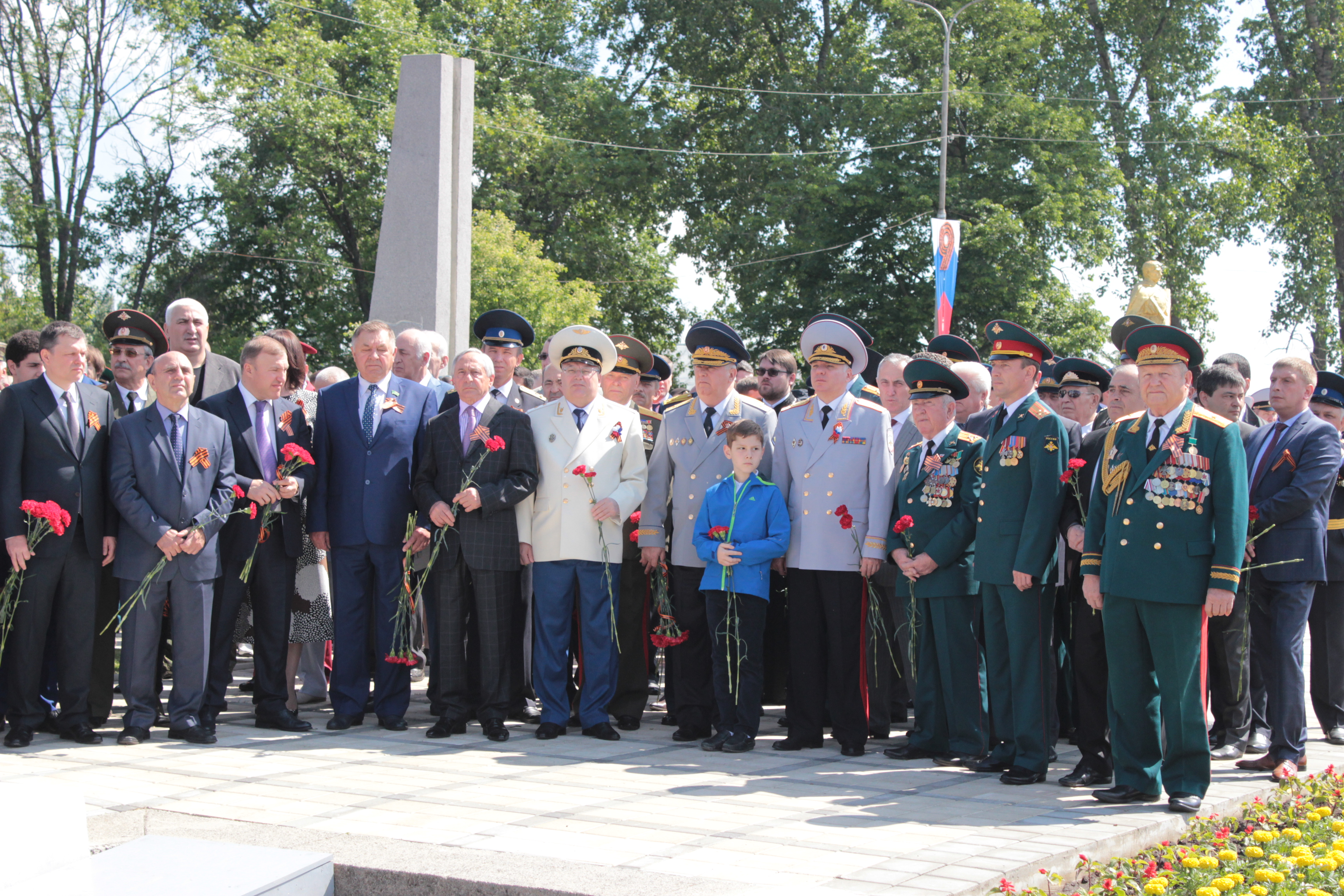 Кумпилов М.К. на возложении цветов в День победы в Майкопе 9.5.16